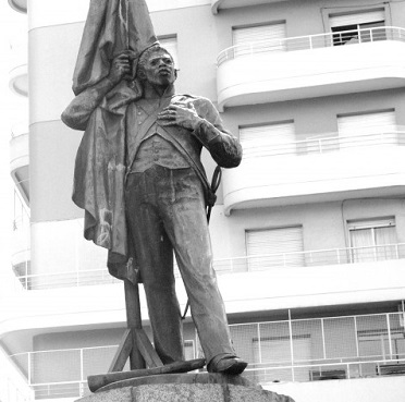 El Negro Falucho